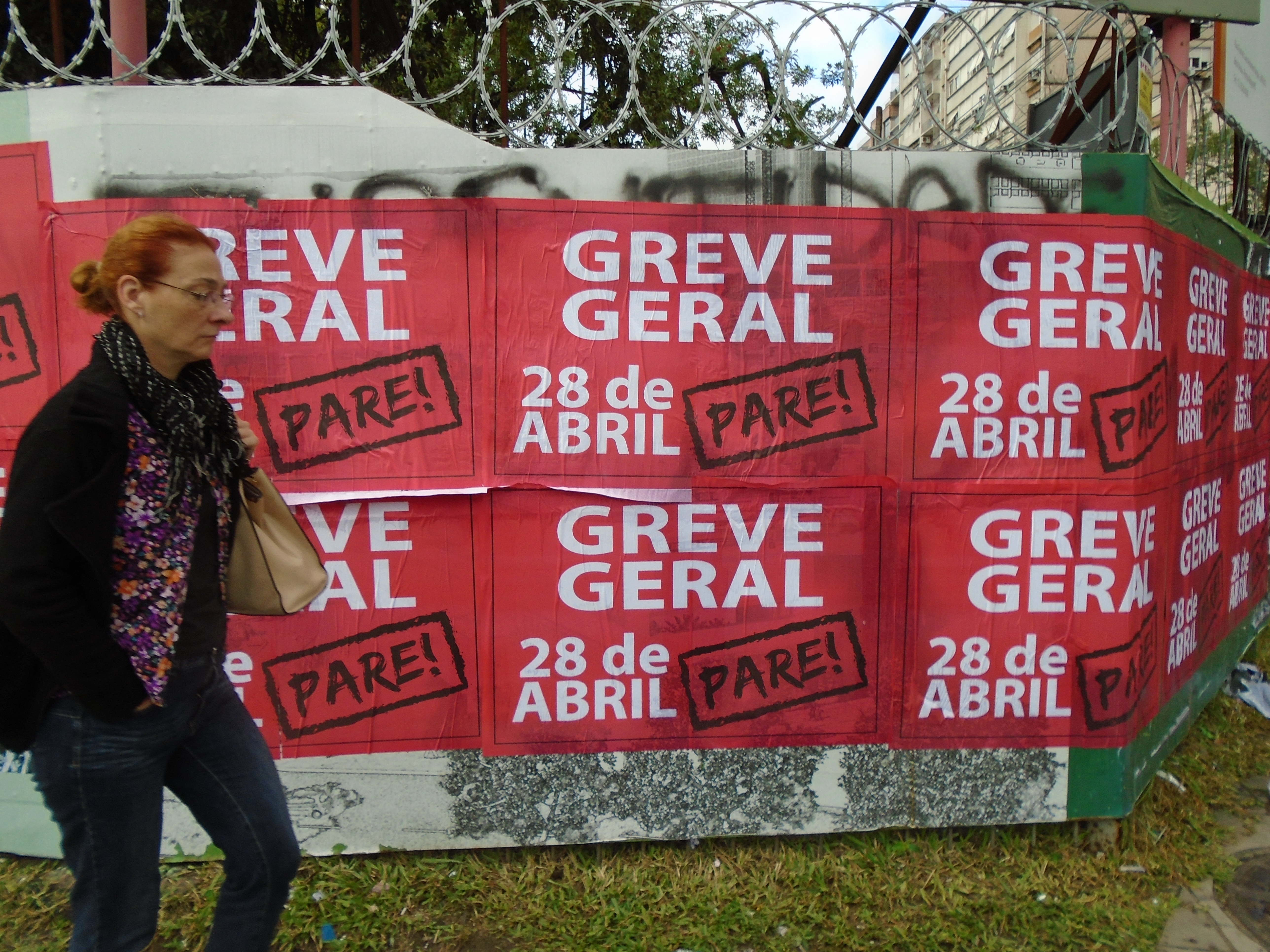 Greve Geral . 28 de abril . Pare! (Porto Alegre, Brasil)